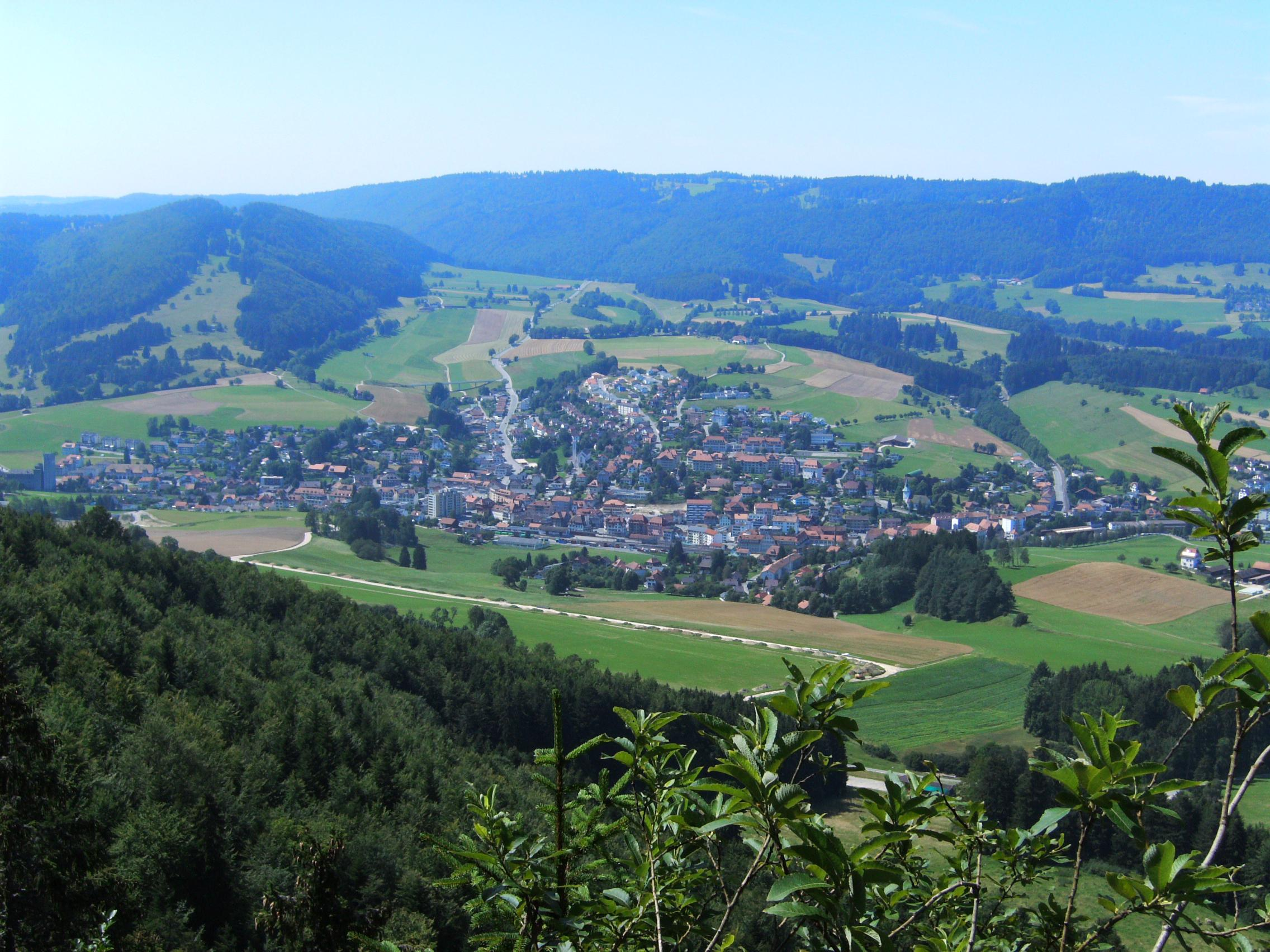 Vue d'ensemble de la commune de Tavannes (BE, Suisse). Prise de la photo depuis la montagne de Montoz.